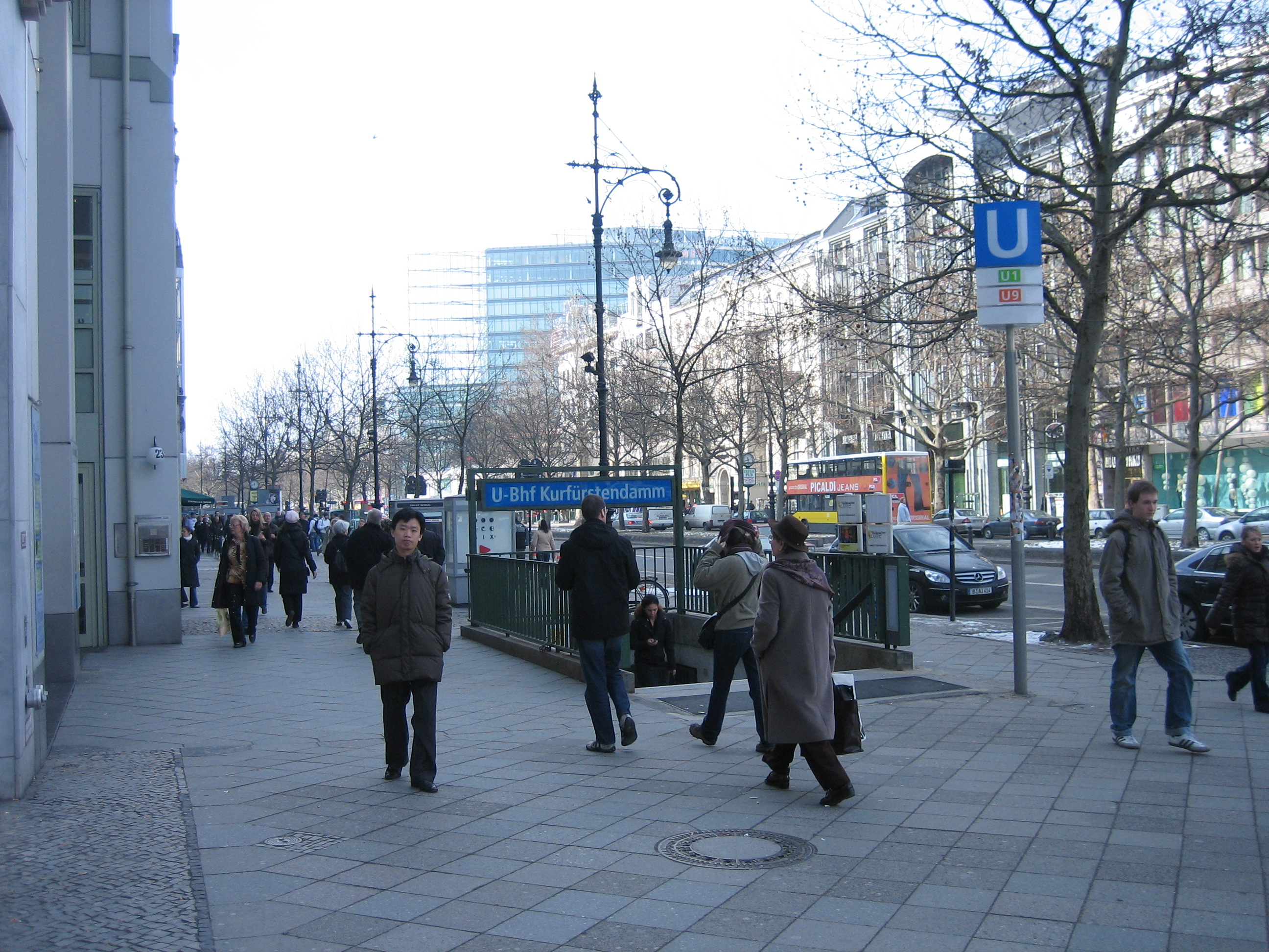 Kurfurstendamm, Metro station